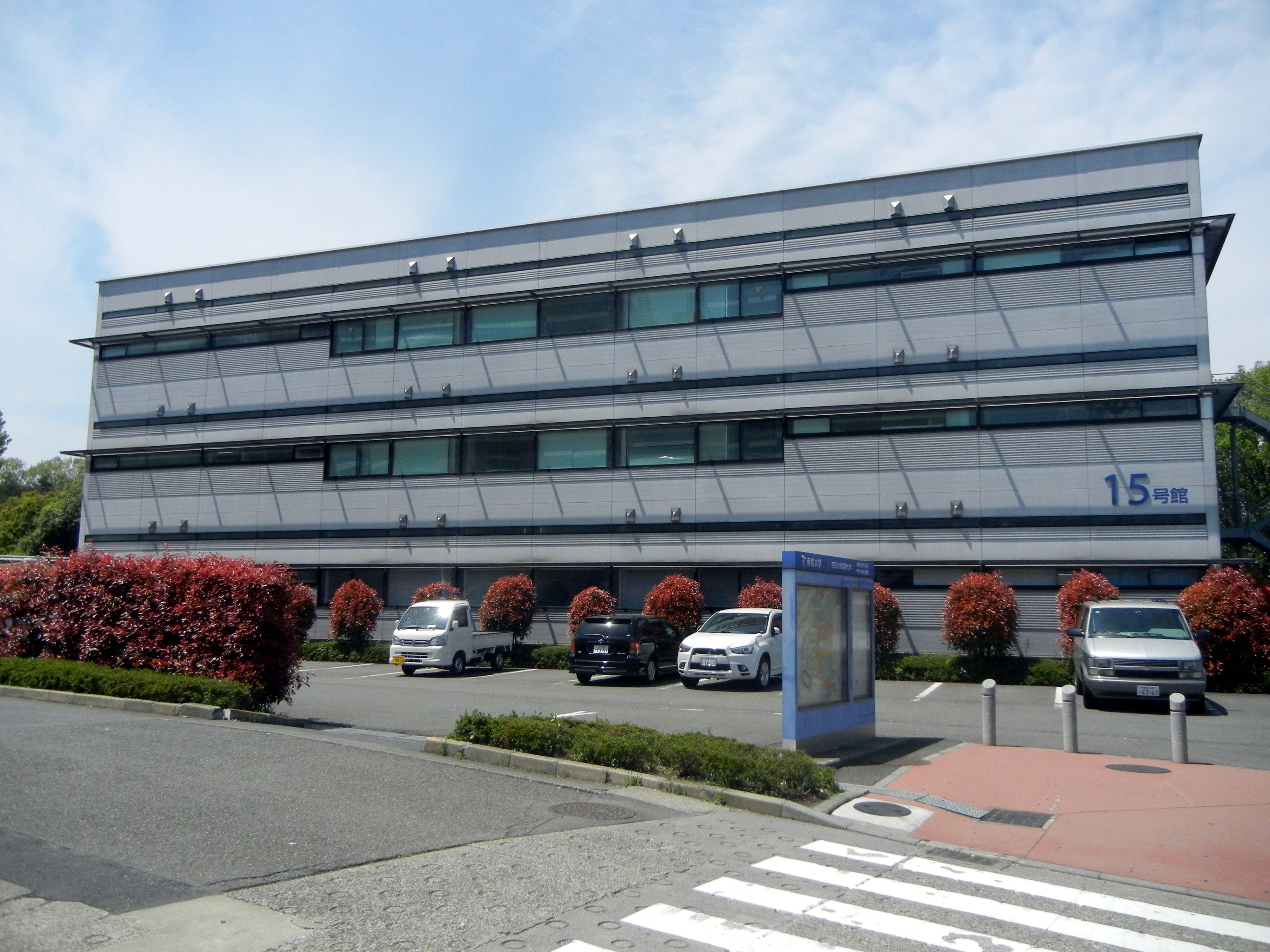 帝京大学八王子キャンパス15号館